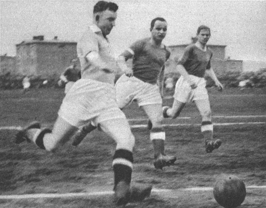 Jednym z najważniejszych meczów ligowych było spotkanie miedzy „Wartą” (Poznań), która zajmuje w tabeli obecnie pierwsze miejsce a trzykrotnym mistrzem Polski, „Ruchem” z Wielkich Hajduk. Spotkanie to zakończyło się remisowo 1:1. Zdjęcie nasze przedstawia fragment z tego meczu. Widoczny od lewej Wilimowski z „Ruchu”, oraz Kryszkiewicz i Twórz z „Warty”.